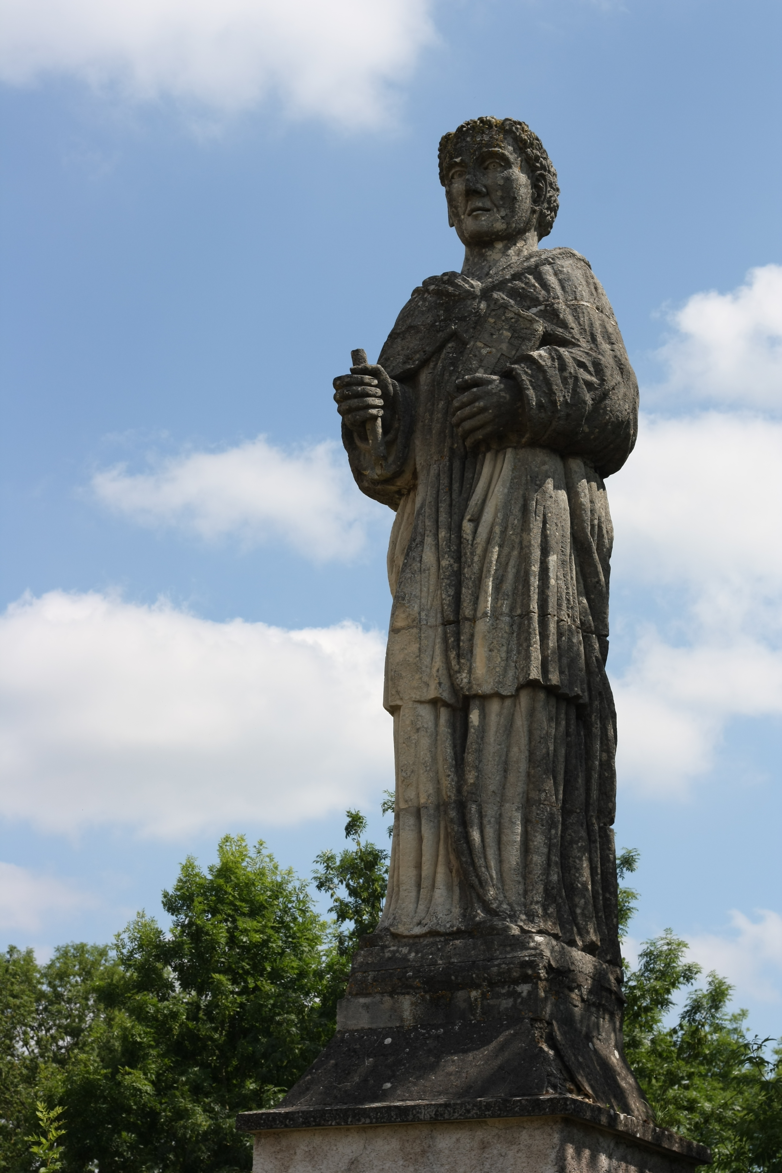 Statue des hl. Eliphius in Soulosse-sous-Saint-Élophe neben der Kirche Saint-Élophe